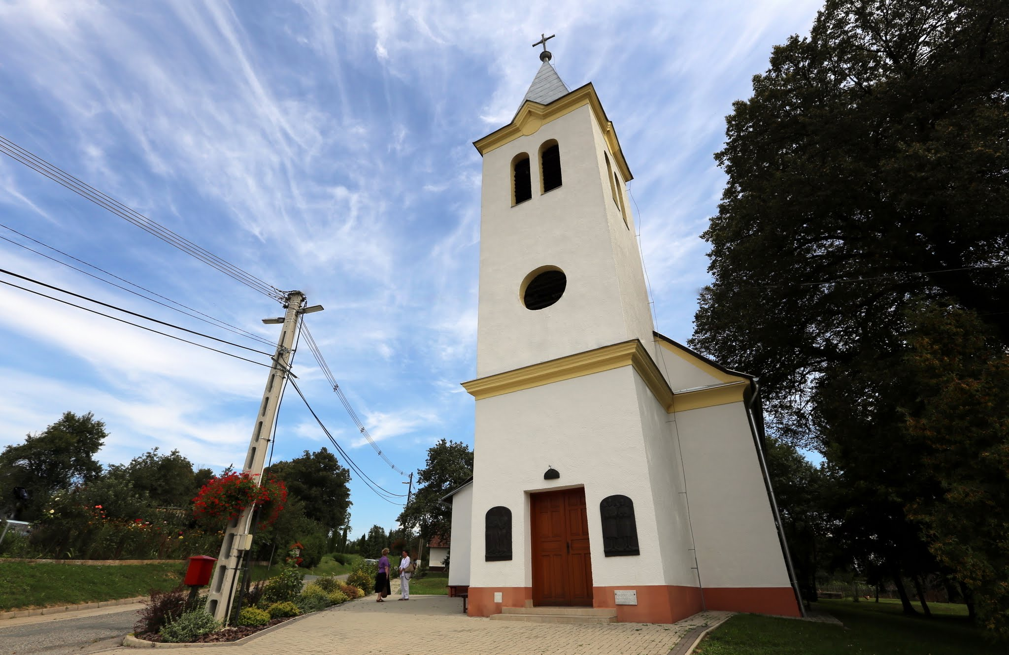 Kondorfa rk temploma